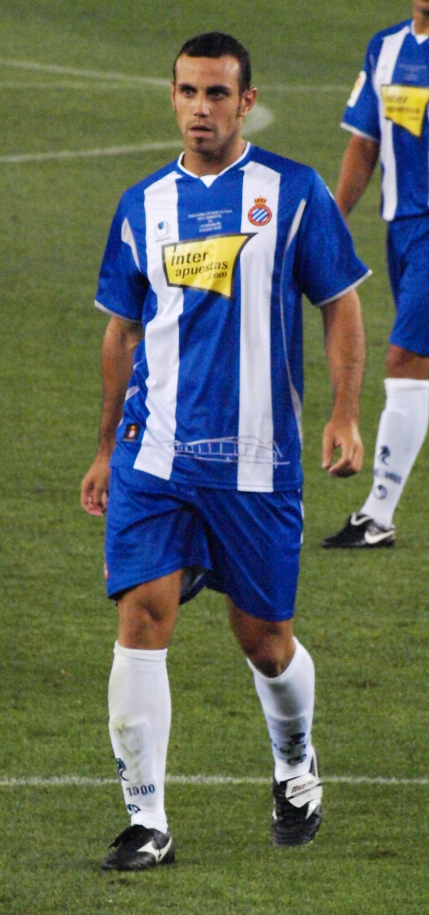 Moisés Hurtado del RCD Español, en el encuentro que enfrentó a su club con el Liverpool FC, que sirvió para dar por inagurado oficialmente el Estadio de Cornellá-El Prat